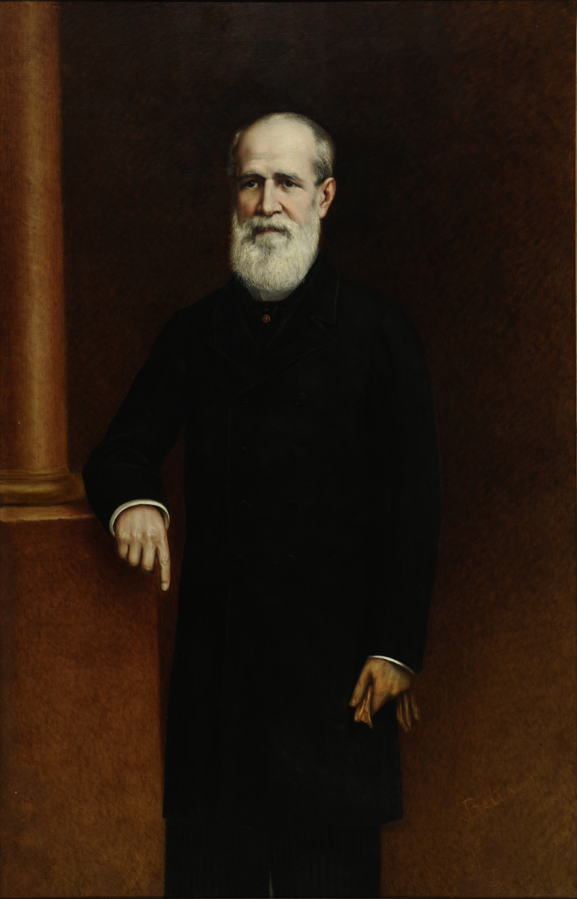 Obra que integra o acervo do Museu Paulista da USP.